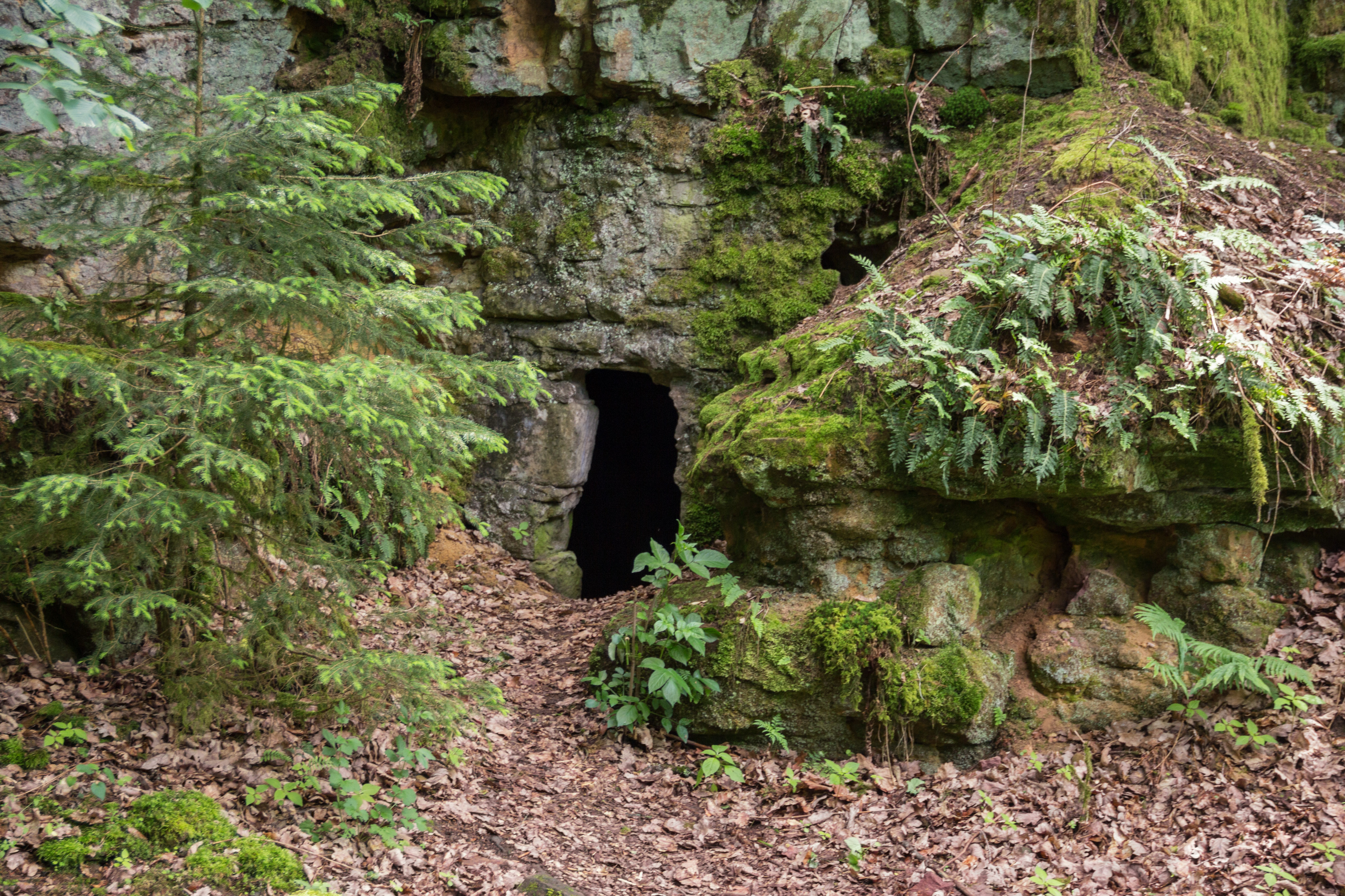 Steinbrüche bei Wendelstein, Wernloch, LSG Schutz des Landschaftsraumes im Gebiet des Landkreises Roth - "Südliches Mittelfränkisches Becken östlich der Schwäbischen Rezat und der Rednitz mit Vorland der Mittleren Frankenalb" (LSG Ost), FFH-Gebiet, Kornberge bei Worzeldorf, Vogelschutzgebiet, Nürnberger Reichswald